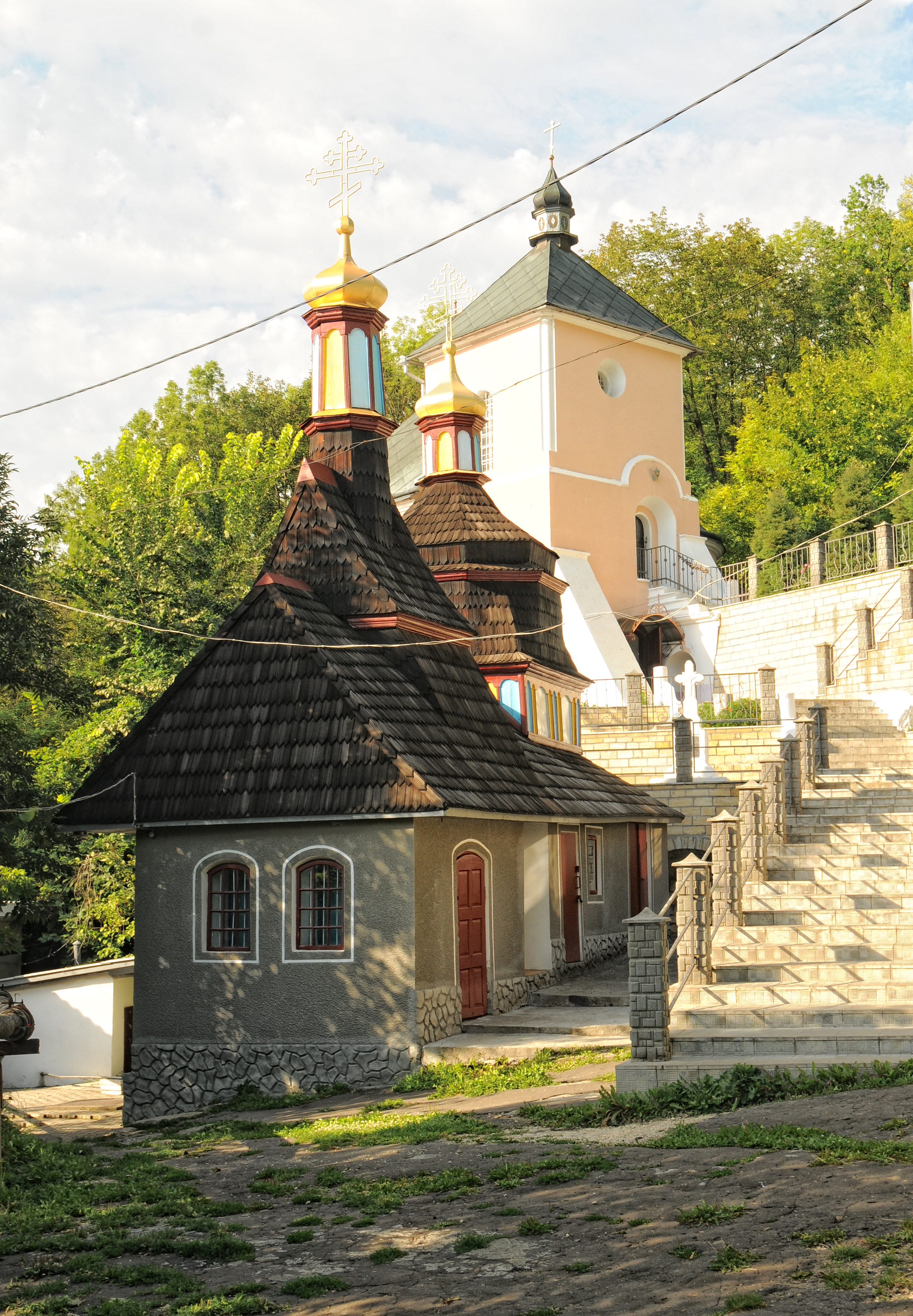 Хрещатицький монастир. Iванiвська церква